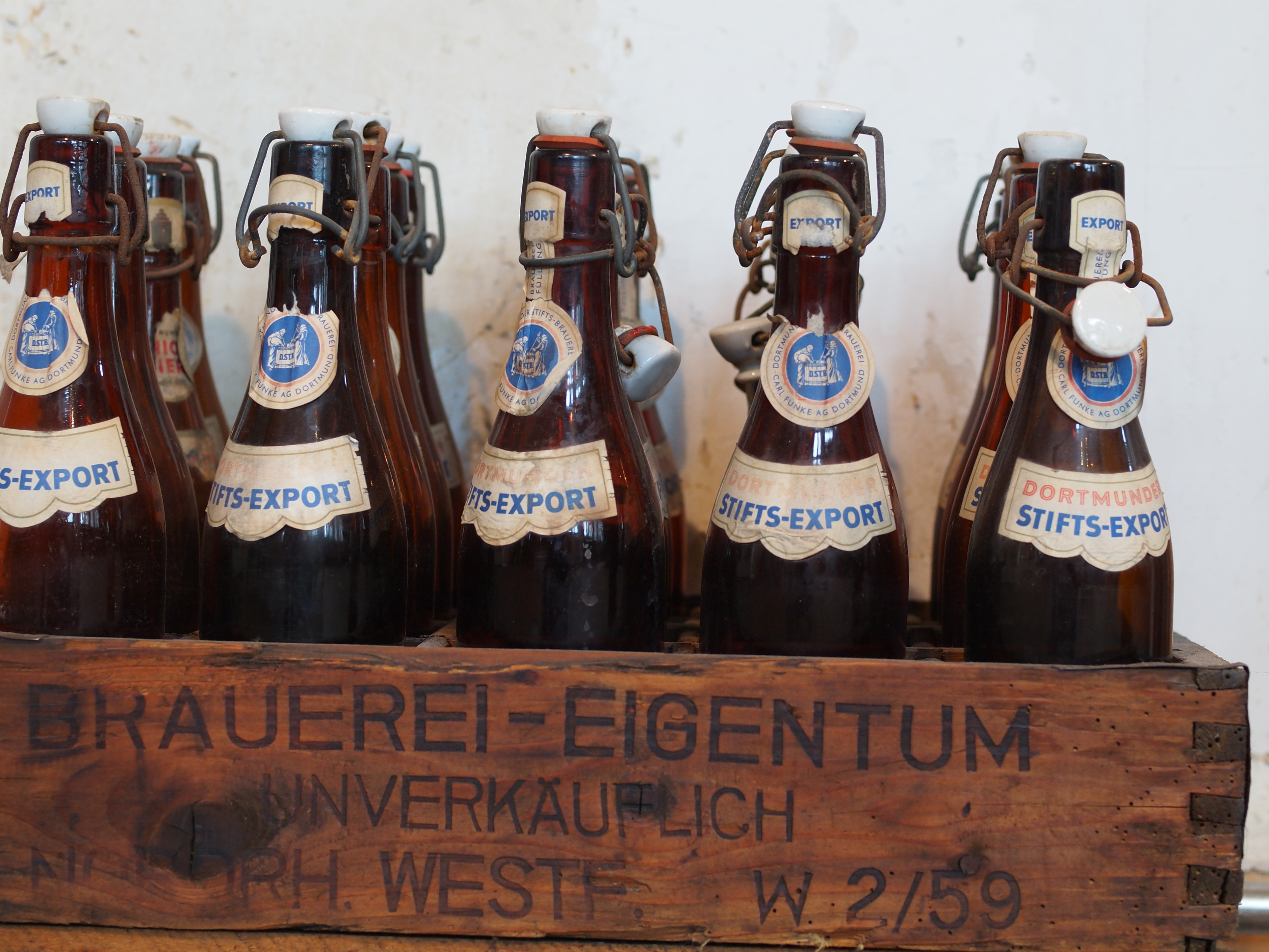 Bierflaschen und Flaschenkasten der Hörder Stifts Brauerei im Heimatmuseum im Burgturm